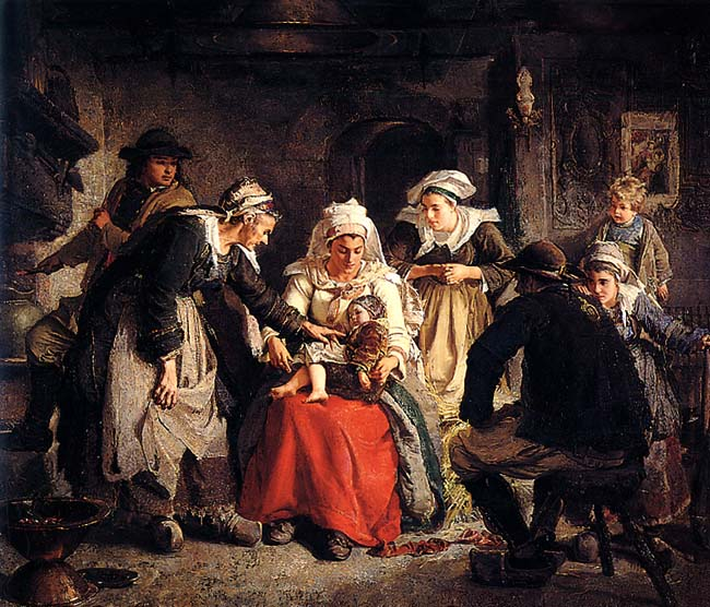 La Sorcière bretonne, painting by American artist Robert Wylie. En fait le tableau représente une diseuse de bonne aventure.